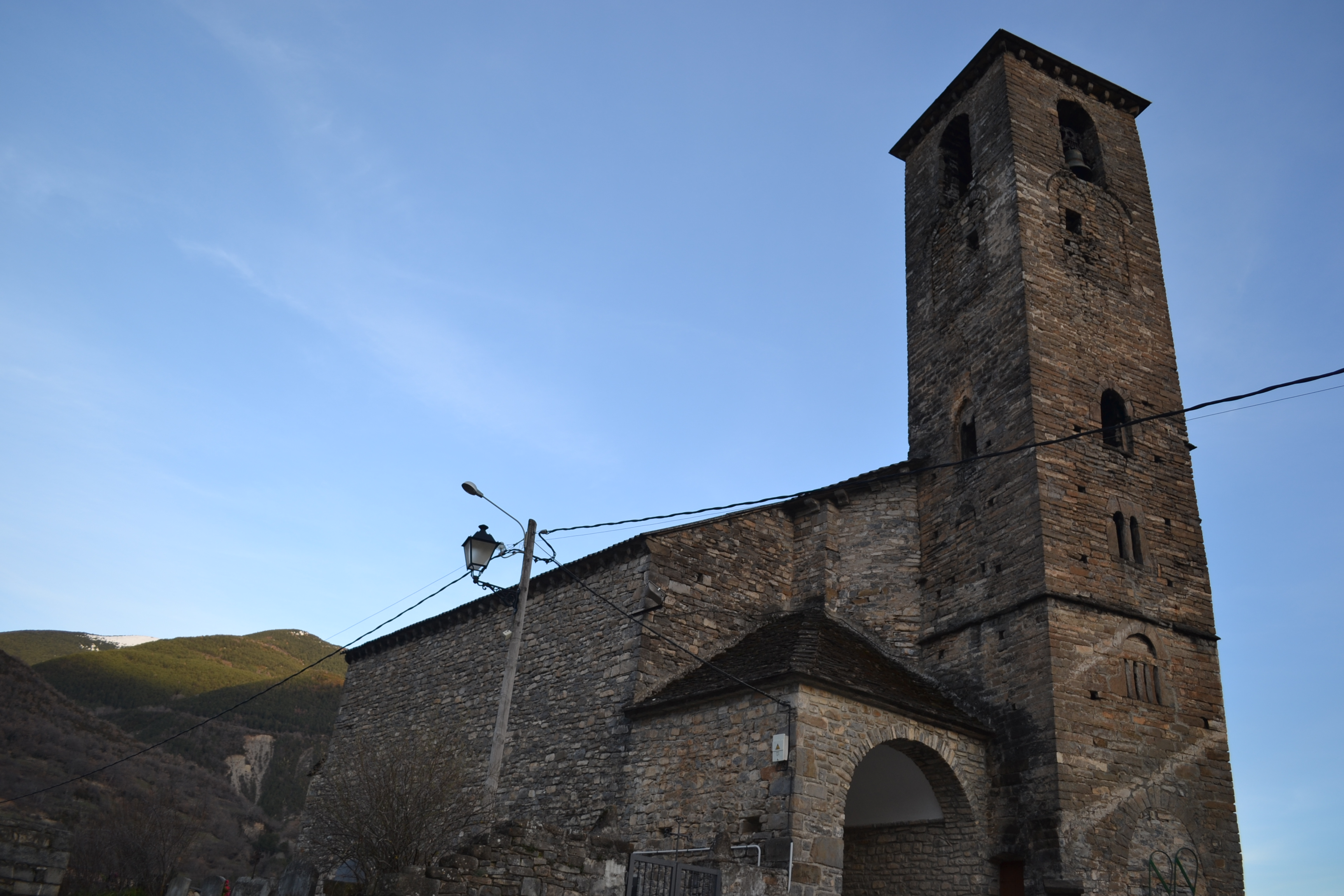 Torre románica